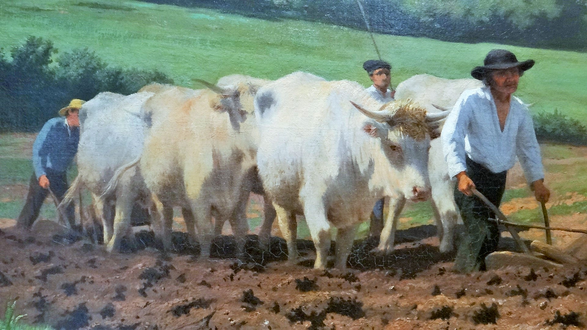 Labourage nivernais dit aussi Le Sombrage (détail), 1849, huile sur toile, Rosa Bonheur